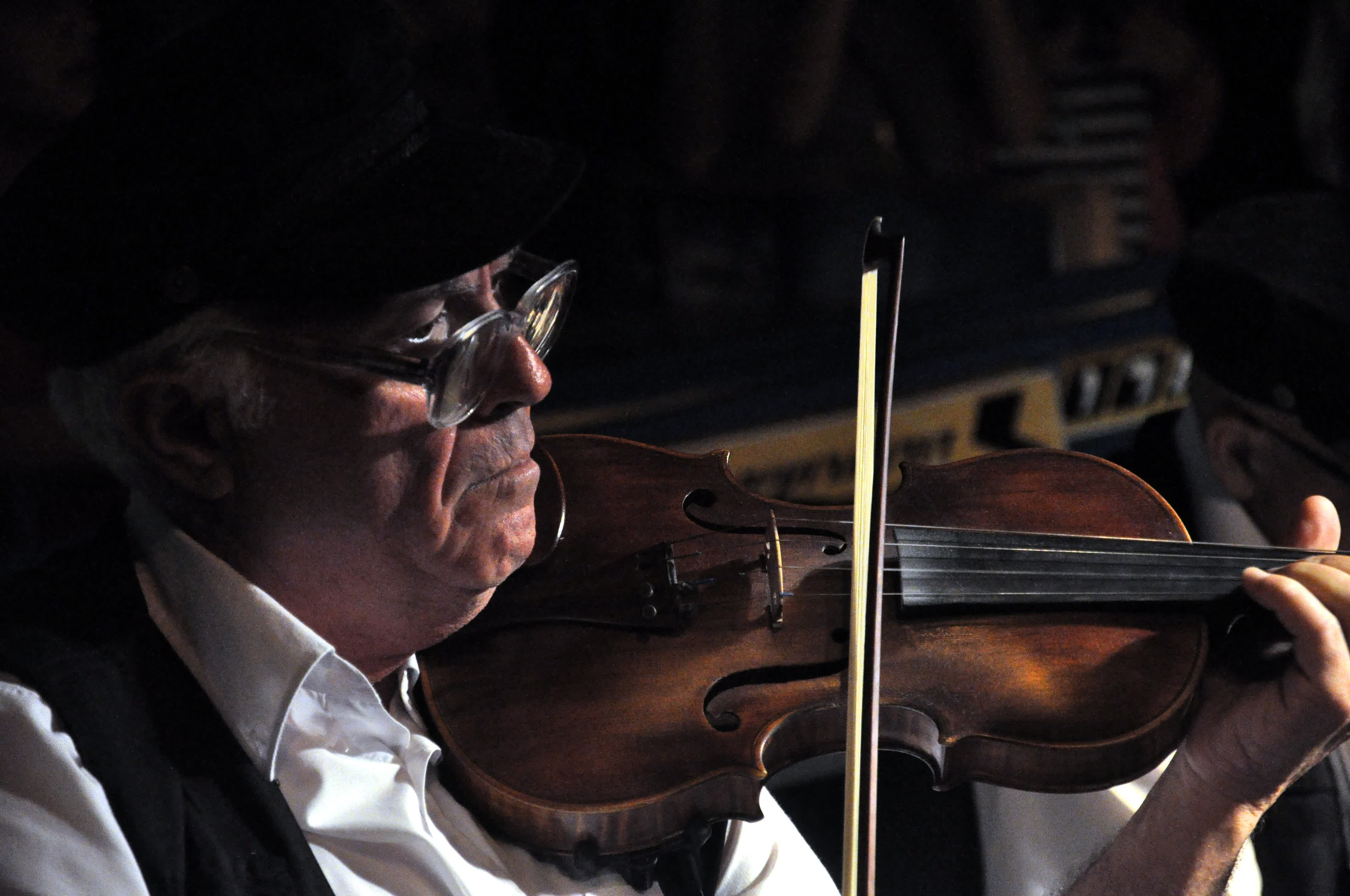 כנר בפסטיבל הכלייזמרים בצפת, אב ה'תשע"א (2011)